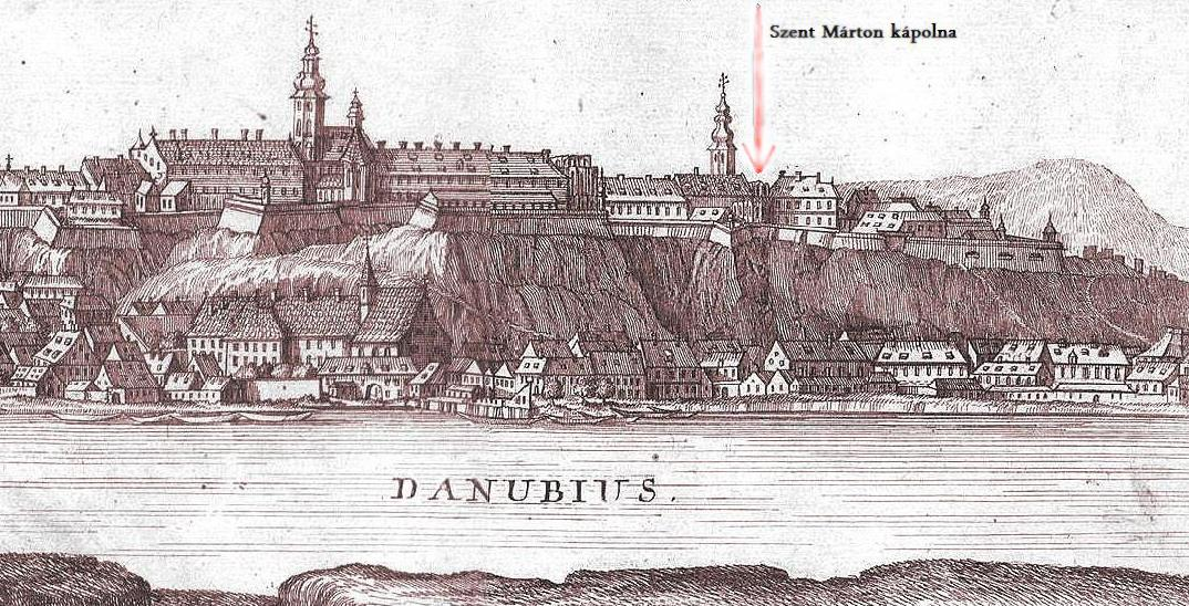 Buda és Pest látképe részlet Mikoviny Sámuel Notitiájából 1737. A budai pénzverő a középkorban Budán működő pénzverő műhely (Királyi Pénzverde vagy Domus Regalis, Magna Curia Regis németül Kammerhof) épületegyüttes része volt.